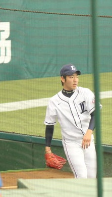 kikuchi yusei lions